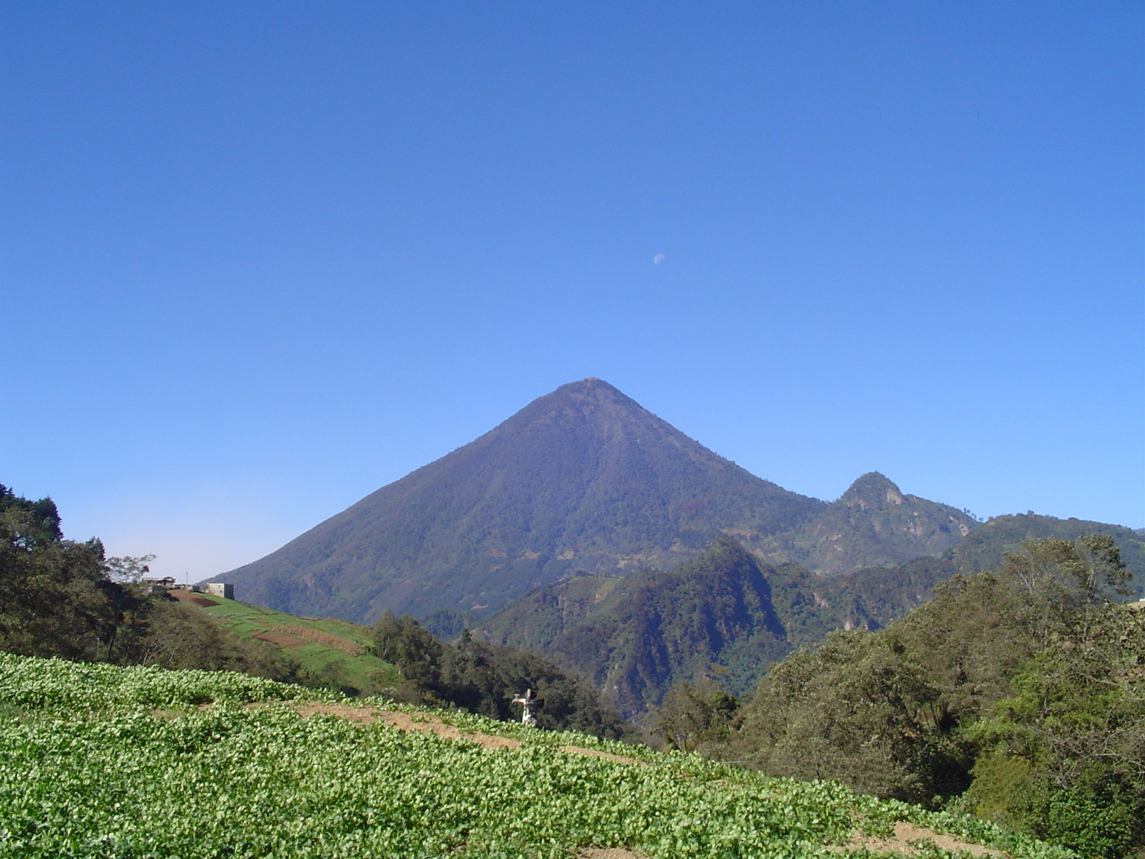 Volcán Santa María, Quetzaltenango, Guatemala (9-1-2007).